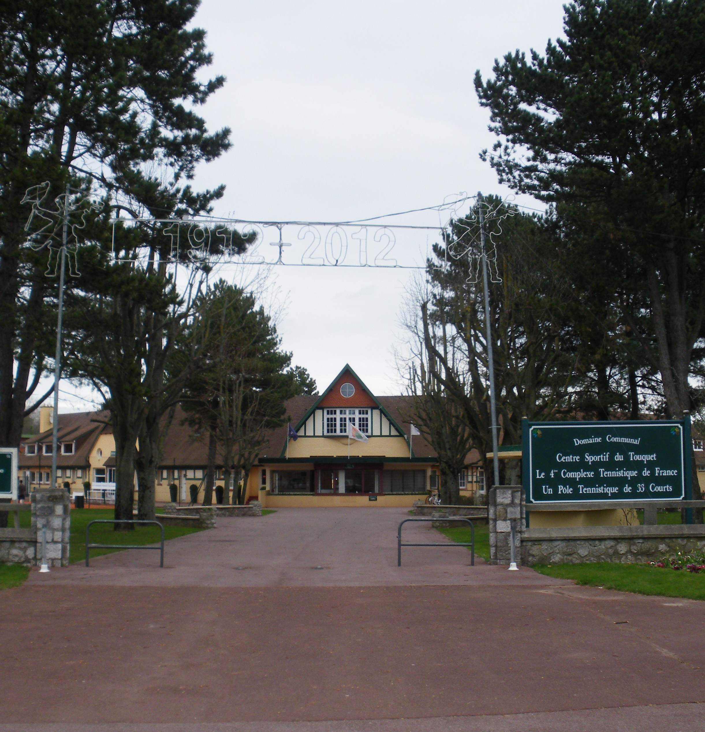 Vue du club house du Touquet Tennis Club.